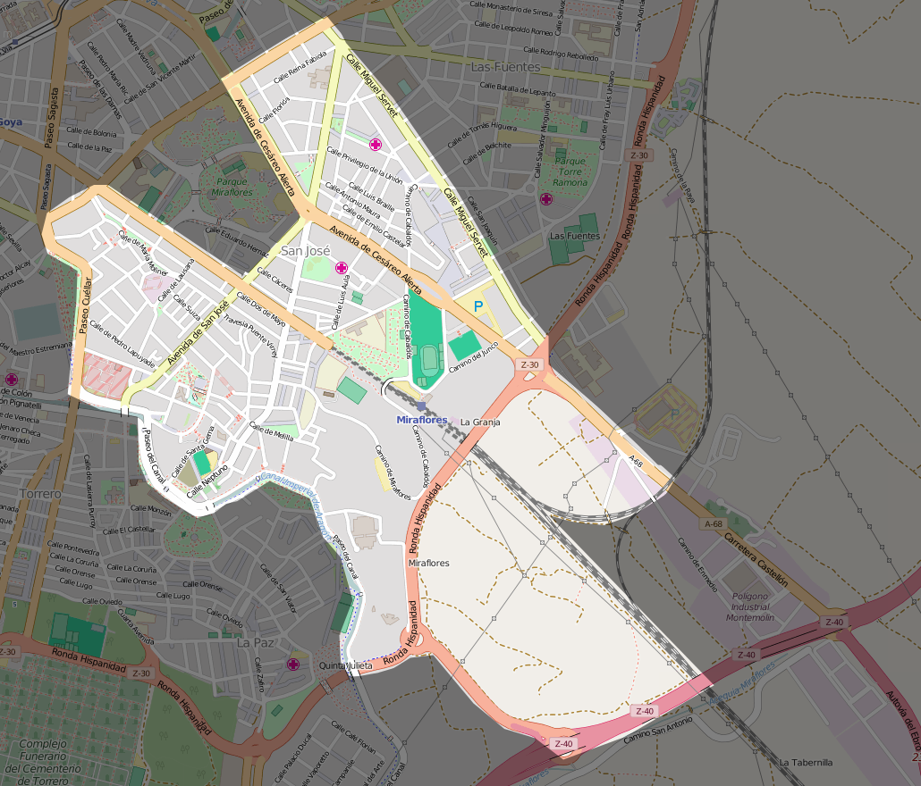 Mapa del distrito de San José en Zaragoza.